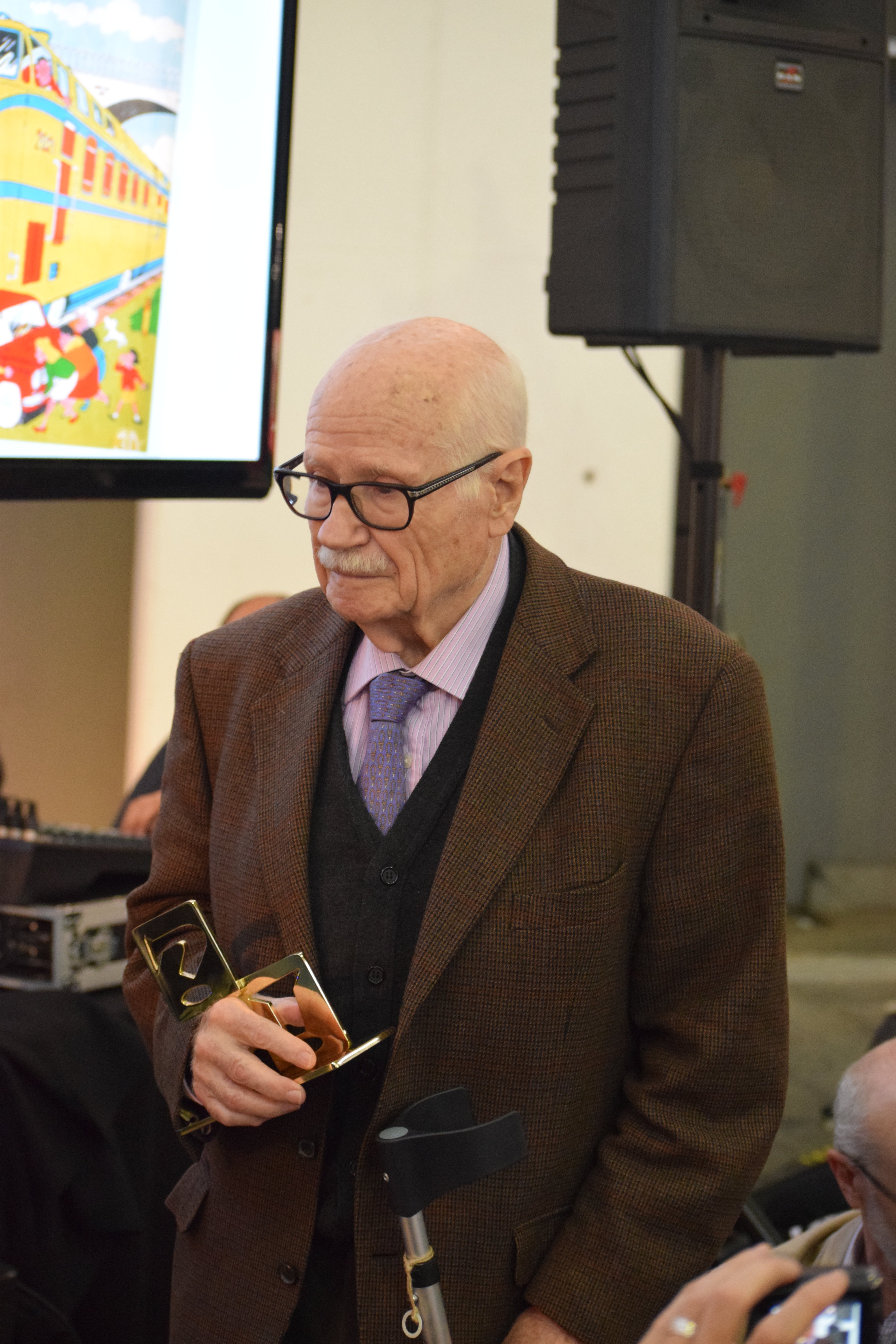 El veterà dibuixant dibuixant de la revista de còmics TBO, Josep Maria Blanco Ibarz, pronunciant un discurs just després d’haver sigut proclamat guanyador del Gran Premi del Saló del Còmic. Foto presa durant la cerimònia d’entrega dels premis del Saló Internacional del Còmic de 2016.